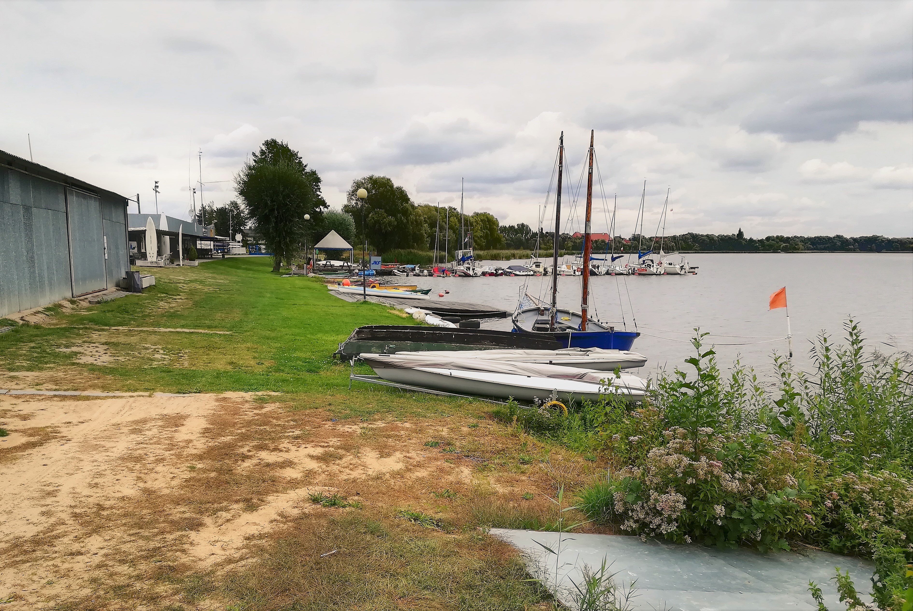 Jezioro Berzyńskie. Marina w Niałku Wielkim.